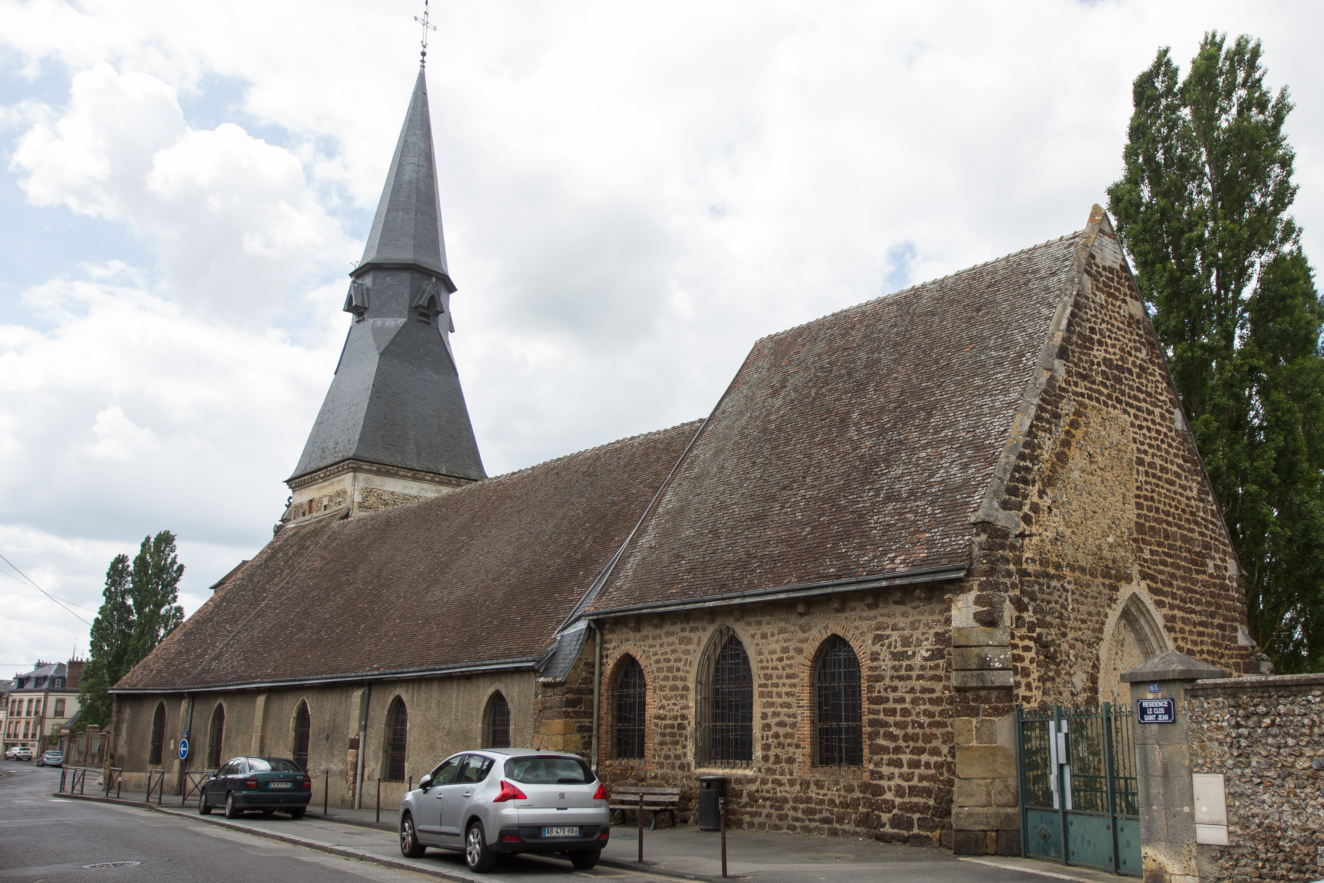 Église Saint-Jean de L'Aigle (Eure, Normandie, France)